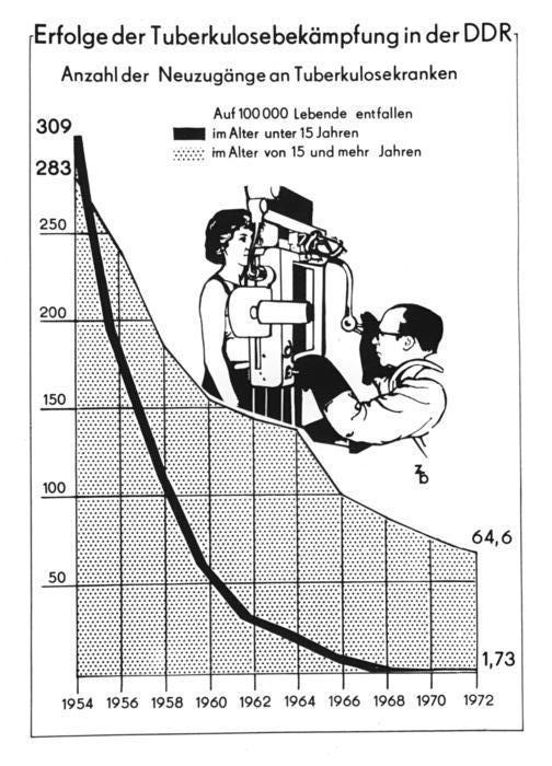 Infografik, Erfolge der DDR bei der Bekämpfung der Tuberkulose ADN-Zentralbild Grafik 26.9.73 Erfolge der DDR bei der Bekämpfung der Tuberkulose Die Tuberkulose-Bekämpfung in der Deutschen Demokratischen Republik war frühzeitig eine Schwerpunktaufgabe des Gesundheitswesens. Mehr als 20 Jahre Kampf gegen die Tuberkulose führte dazu, daß die Tuberkulose-Erkrankungen kontinuierlich zurückgingen, weil medizinisch-wissenschaftliche Forschungen und gesellschaftliche Erkenntnisse integriert zur Wirkung gebracht wurden. Die Kinder-Tuberkulose ist praktisch verschwunden, und die Erkrankungsziffern der Jugendlichen und jungen Menschen sind sehr niedrig. Im Jahre 1972 gab es in der DDR nur noch 68 neue Fälle von Tuberkulose im Kindesalter unter 15 Jahren. Etwa 12.000 Kinder erkrankten noch im Jahre 1954. Kein Kind ist 1972 an Tuberkulose gestorben. Je 100.000 Kinder im Alter bis unter 15 Jahren erkrankten 1972 nur noch 1,7 , während es im Jahre 1954 noch 308,8 waren. Bei den Erwachsenen lagen die Erkrankungsziffern 1972 je 100.000 bei 64,6 gegenüber 282,7 im Jahre 1954. Der stetige jährliche Rückgang der Tuberkulose in der DDR ist nicht zuletzt das Ergebnis der 1951 52 eingeführten Tuberkulose-Schutzimpfung - gegenwärtig werden etwa 99,8 % der Neugeborenen in Kliniken geimpft- und der seit 16 Jahren jährlich wiederholten Röntgenreihenuntersuchungen nahezu der gesamten Bevölkerung der DDR. Bitte beachten Sie hierzu unsere Fotos M 0926-2N bis 4N außer Telebildvertragskunden